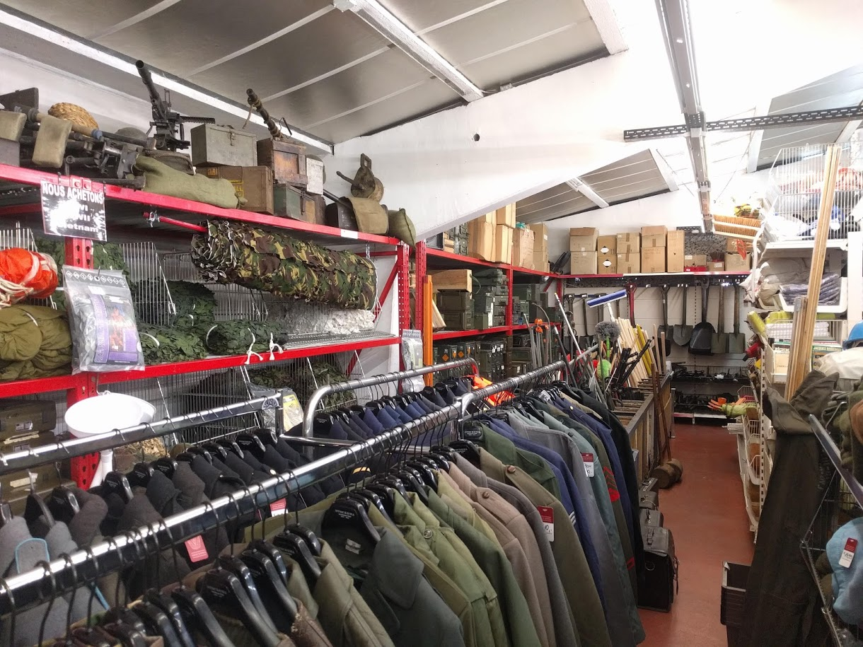 A typical view inside a Flemish American Stockhouse